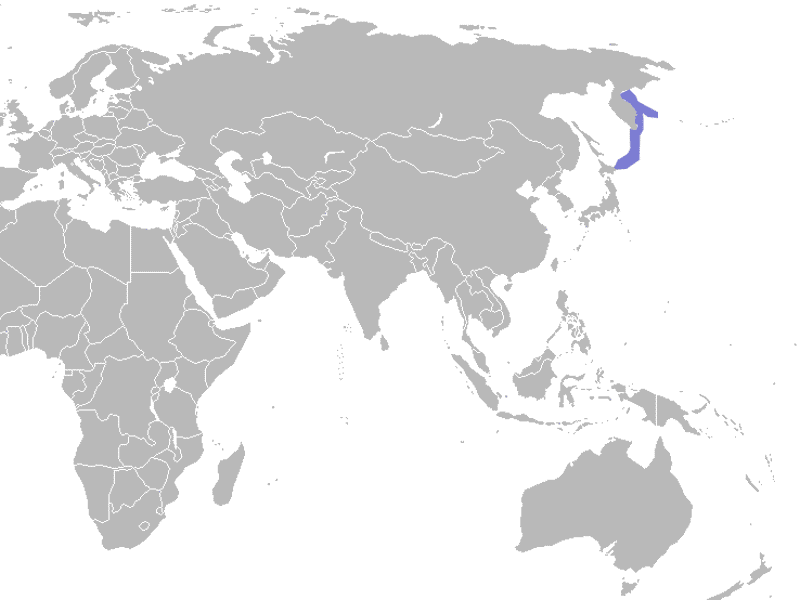 Phoca vitulina stejnegeri range map